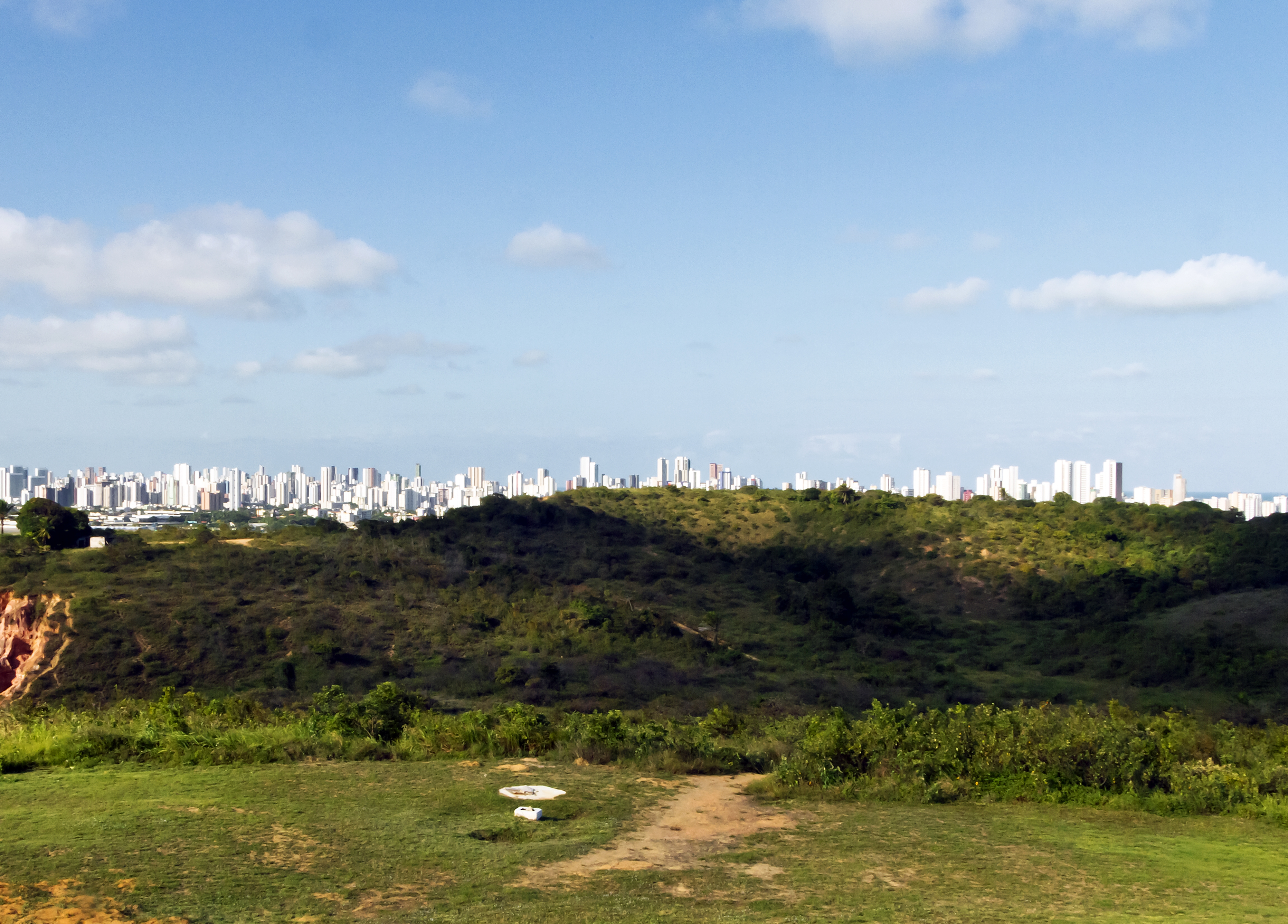 Recife vista do Morro dos Guararapes - Pernambuco, Brasil